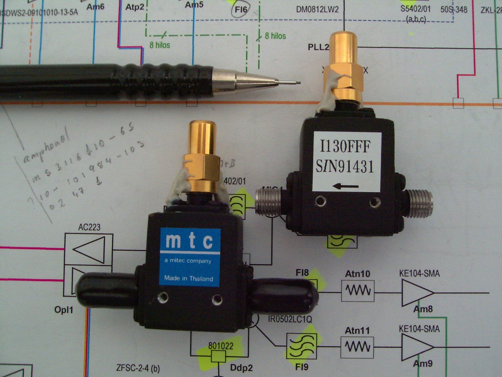 Aislador Coaxial